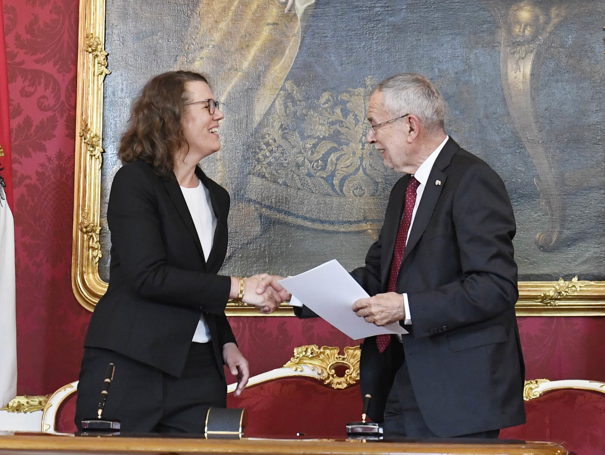 Am 3. Juni 2019 wurde Mag. Alexander Schallenberg als Bundesminister für Europa, Integration und Äußeres angelobt. Foto: Mahmoud